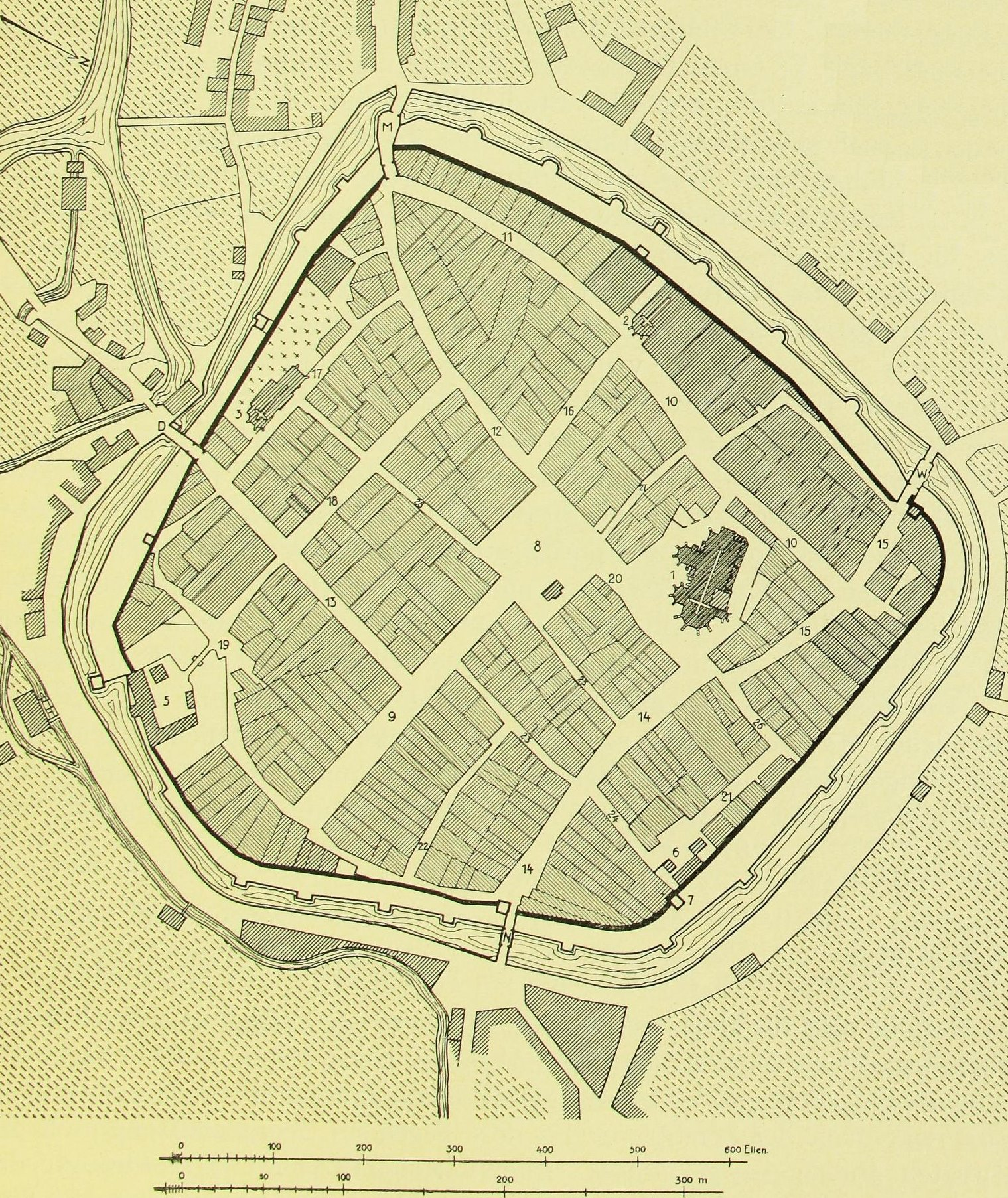 Großenhain, Sachsen, Stadtplan von 1745: 1 = Marienkirche (und Kirchplatz) 2 = Magdalenenkloster 3 = Servitenkirche 4 = Katharinenkirche 5 = Schloss 6 = Ratsfrohnveste 7 = Pulverturm 8 = Markt (heute Hauptmarkt) 9 = Frauenmarkt 10 = Viehmarkt (heute Neumarkt und Gabelsberger Straße 11 = Klostergasse 12 = Meißner Gasse (heute Meißner Straße) 13 = Dresdner Gasse (heute Dredner Straße) 14 = Naundorfer Gasse (heute Naundorfer Straße) 15 = Wildenhainer Gasse (heute Berliner Straße) 16 = Schuhgasse (heute Poststraße) 17 = Neue Kirchgasse (heute Heinrich-Heine-Straße) 18 = Radegasse (heute Schloßstraße) 19 = Hinterm alten Schlosse (heute Schloßplatz) 20 = Kirchplatz 21 = Töpfermarkt (heute Topfmarkt) 22 = Jüdentauche (heute Lindengasse) 23 = Siegelgäßchen (heute Siegelgasse) 24 = Büttelgäßchen (heute Braugasse) 25 = Markt- oder Saugäßchen (heute Marktgasse) 26 = Töpfergäßchen (heute Töpfergasse) 27 = Salzgäßchen (heute Salzgasse) 28 = Kleine Mönchsgasse und Apothekergäßchen (heute Klempnergäßchen und Apothekergasse)